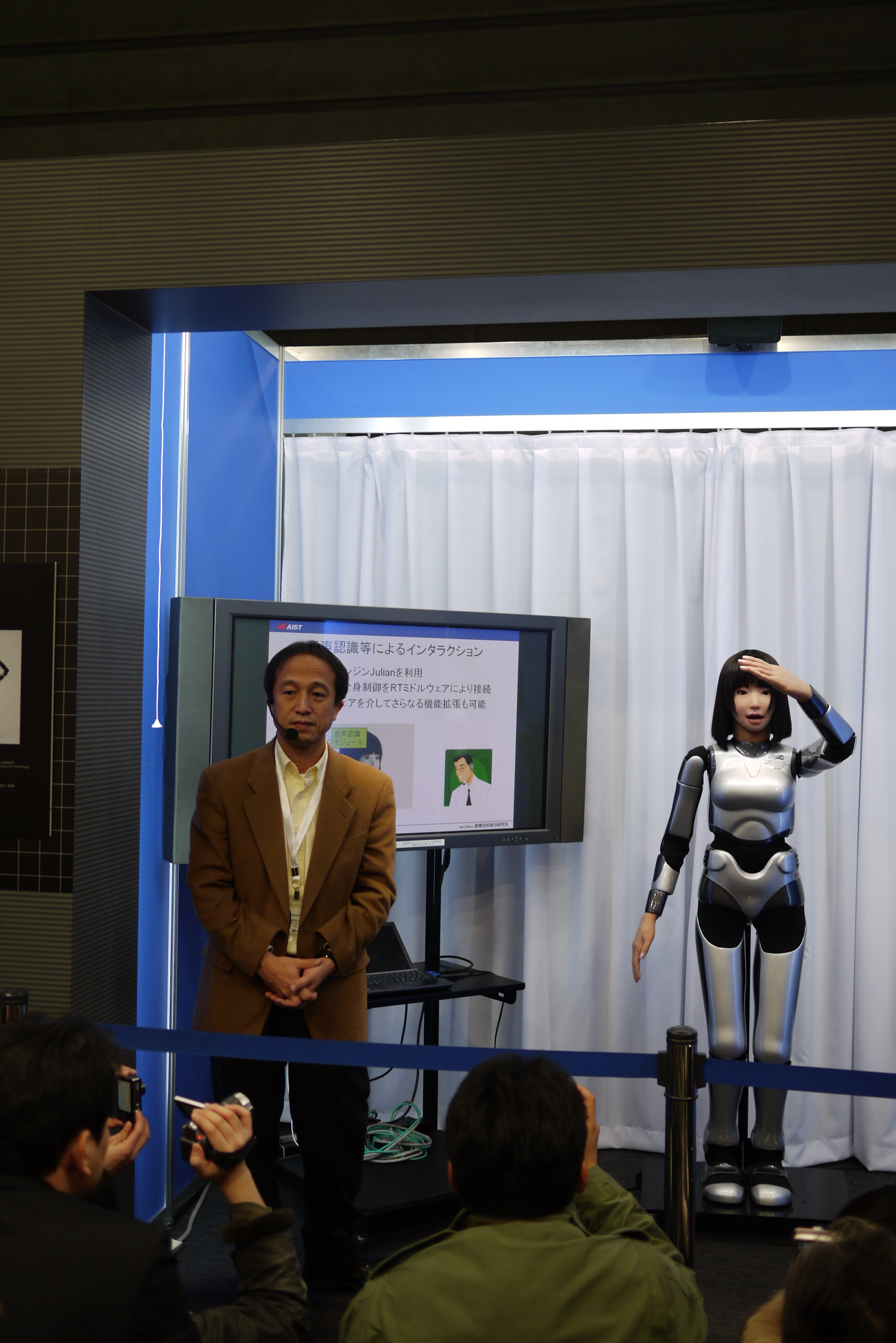 HRP-4C